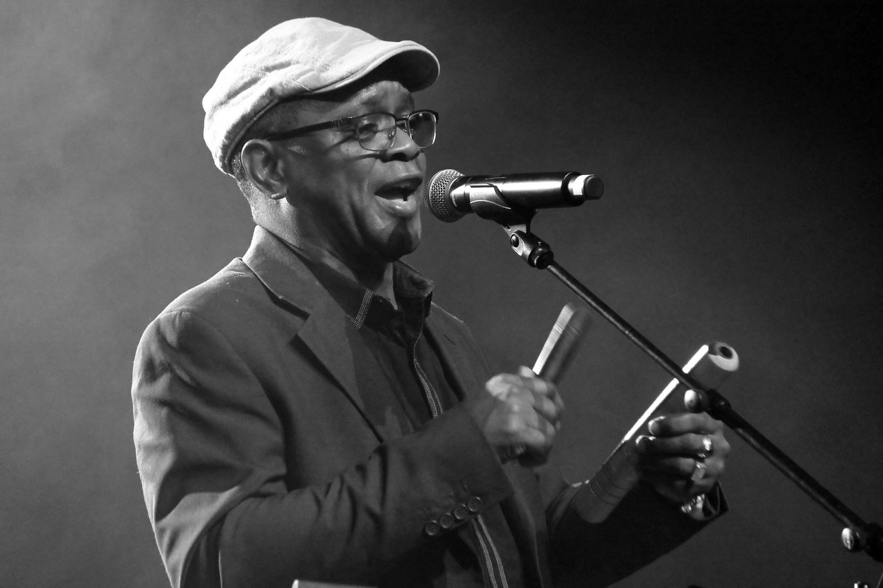 Der kubanische Sänger El Nene auf dem Jazzfestival St. Ingbert 2019